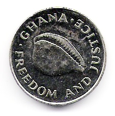 scan of own coins; Münze Ghana Muschel 1991 Steel 20 cedis; mit einer Kaurischnecke